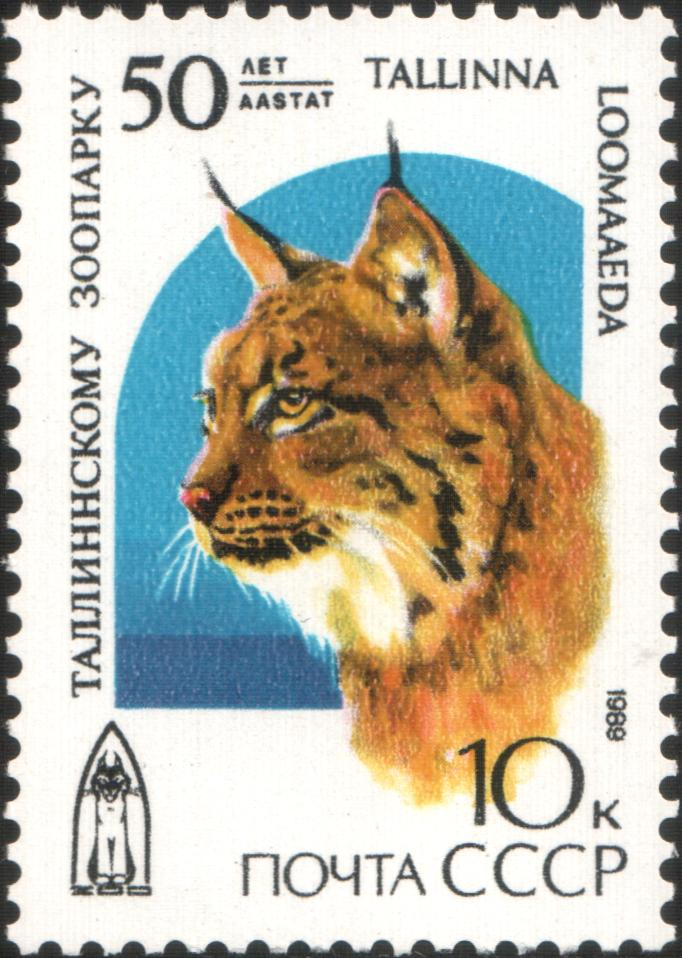 Почтовая марка СССР, посвящённая 50-летию Таллинского зоопарка. Рысь, 1989